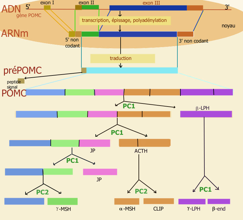 Modification post-traductionnelle de la proopiomélanocortine POMC